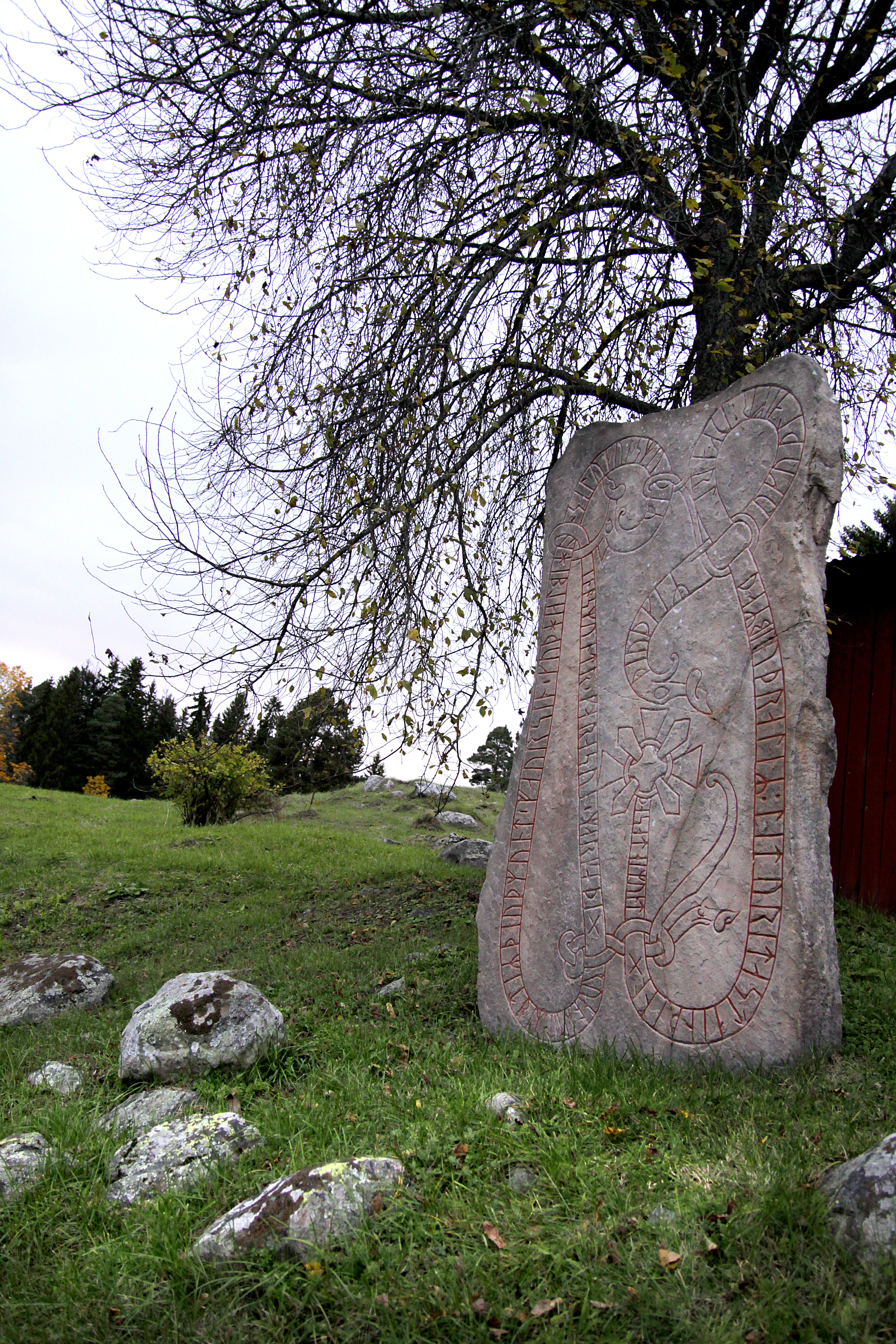 Mycket välbevarad runsten i Järvsta, Gävle